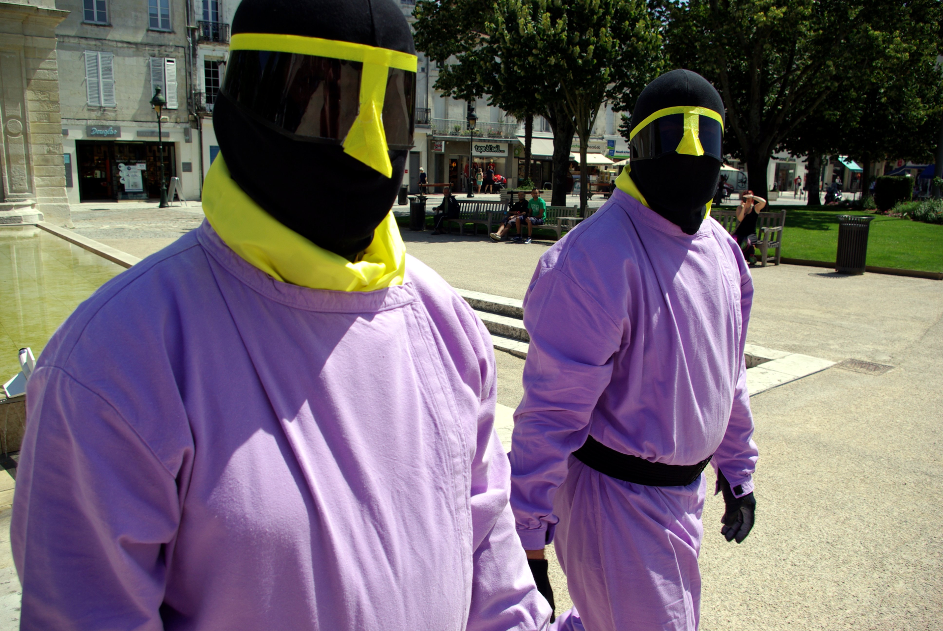 "Nimby", 113ème intervention du groupe Art112. Rochefort, Charente-Maritime.